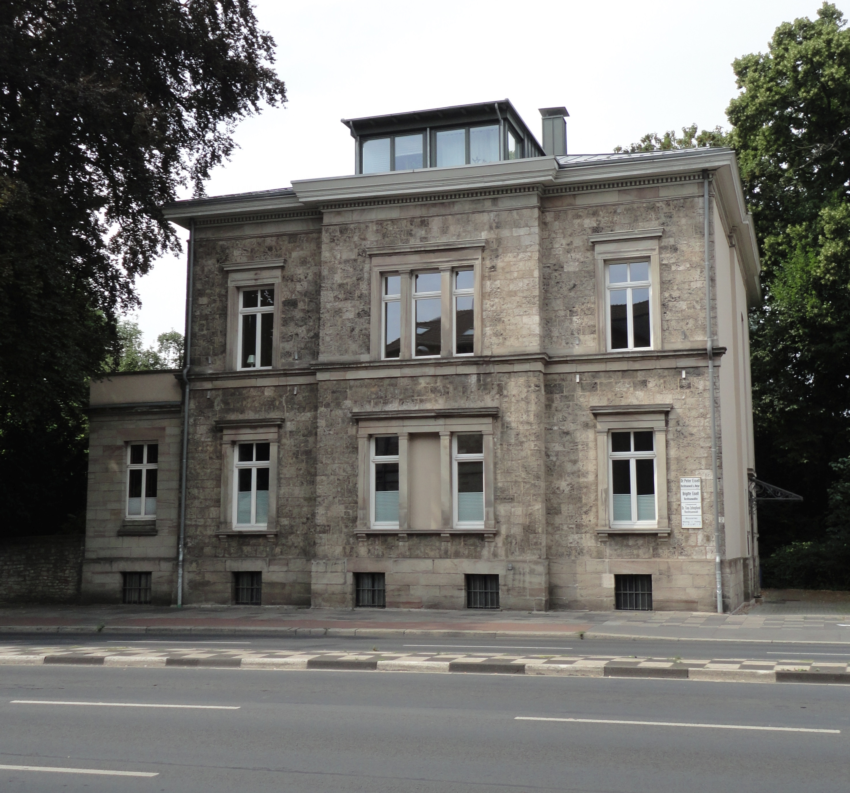 Gebäude am Rosdorfer Weg Nr. 2 in Göttingen, Niedersachsen